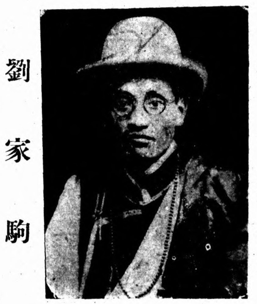 國聞週報 出版日期：1931 卷號：第8卷 期號：第28期 頁碼：1